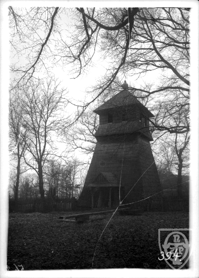 Dzwonnica w Krzeszowie około 1900 r.